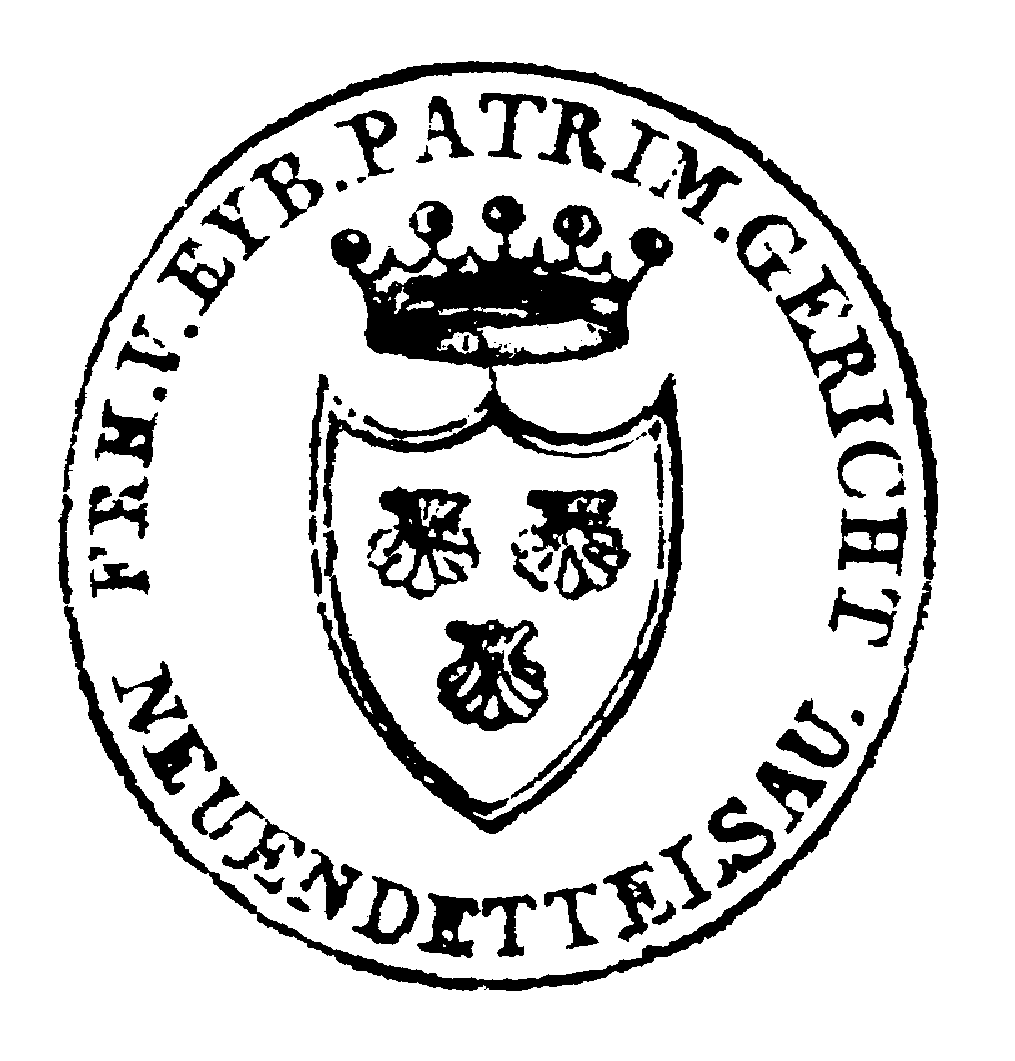 Siegel des freiherrlich von Eybschen Patrimonialgerichtes Neuendettelsau (1806-1848)